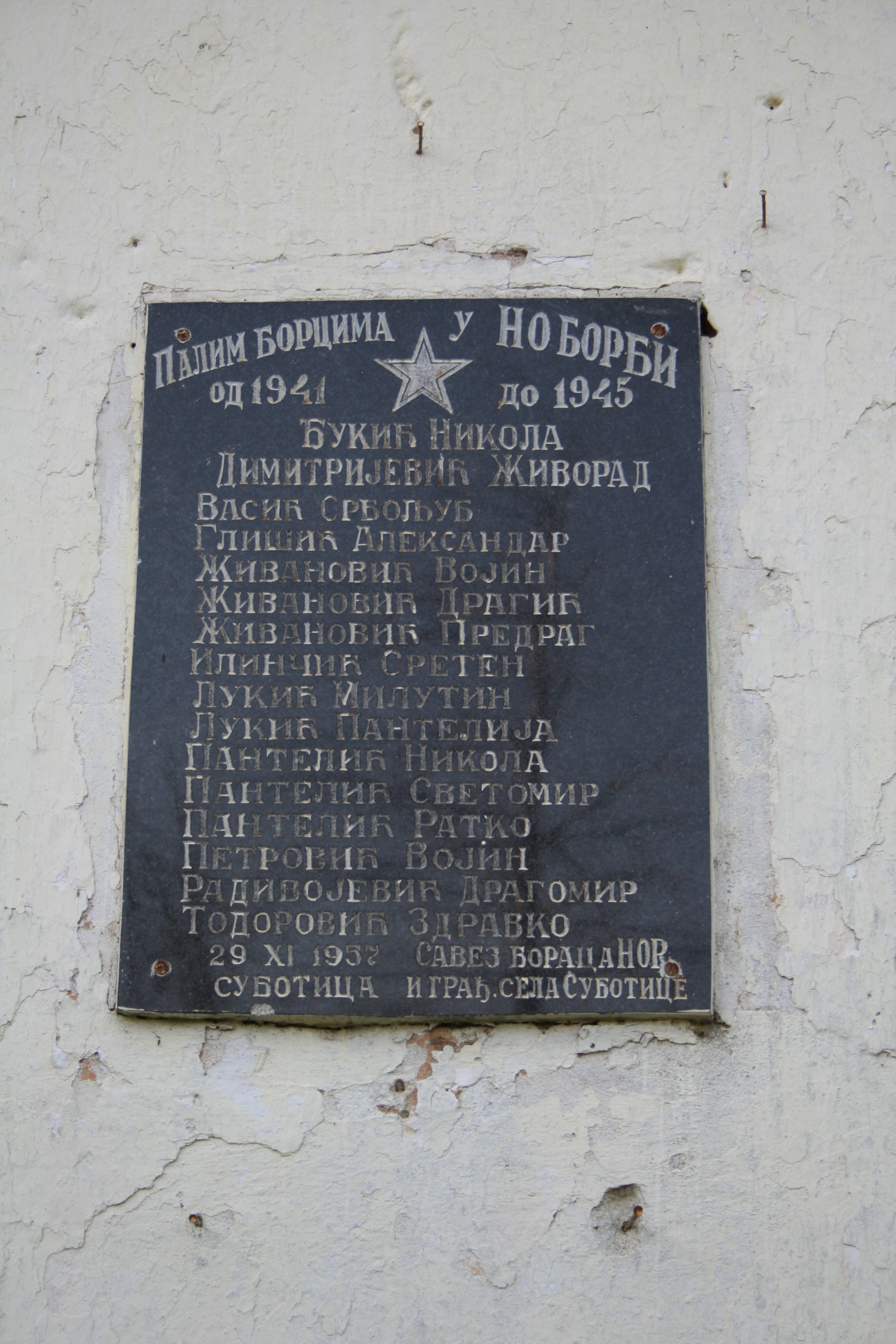 Spomen ploča na zgradi škole, Subotica (Koceljeva)